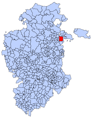 Santa María de Ribarredonda en Burgos